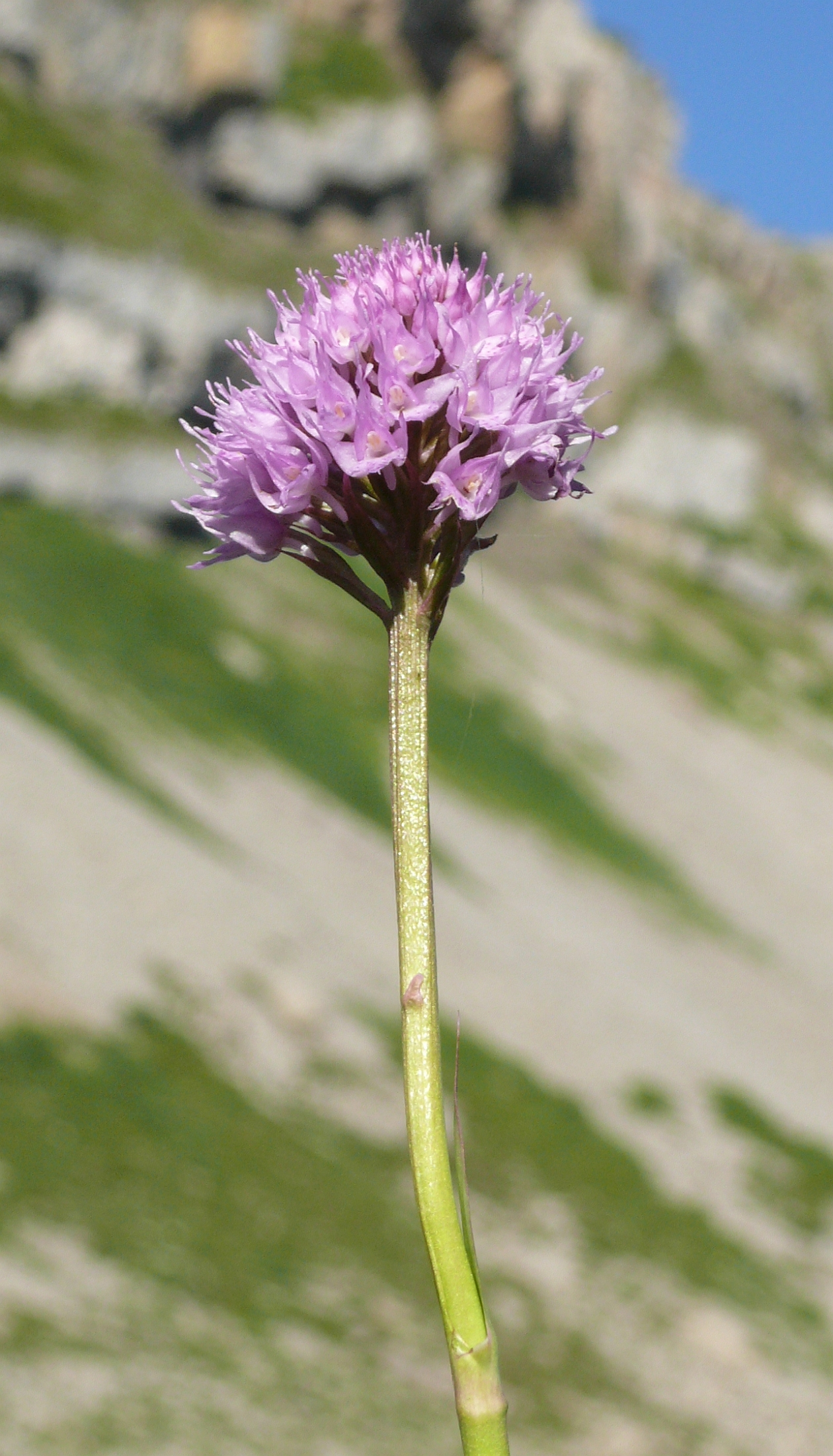 Traunsteinera globosa, Allgäuer Alpen, Österreich